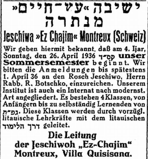 Annonce publicitaire pour la Yechiva Etz Haïm de Montreux, « Der Israelit », 27 février 1936.